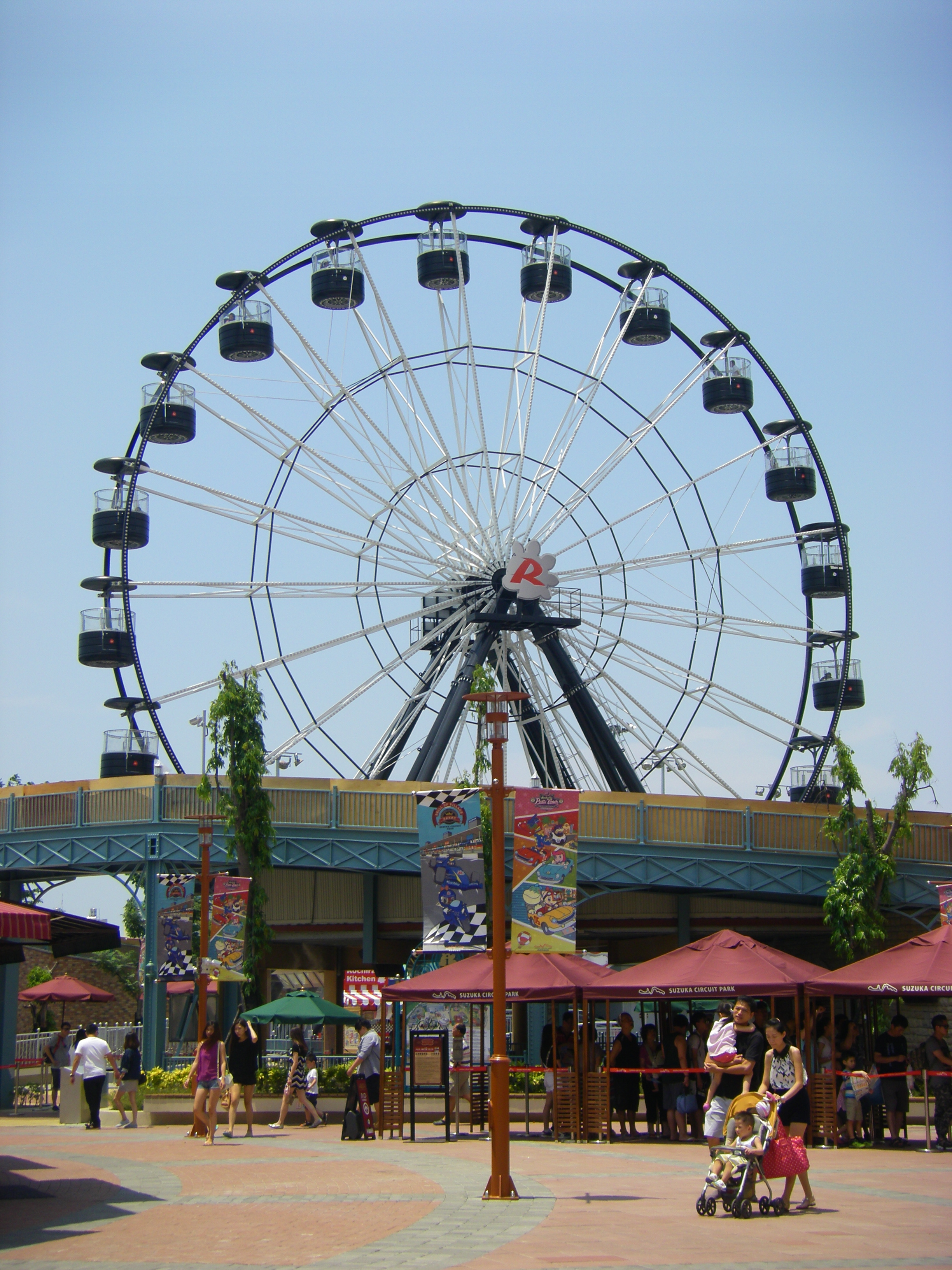 中文（台灣）: 位於大魯閣草衙道鈴鹿賽道樂園的摩天輪